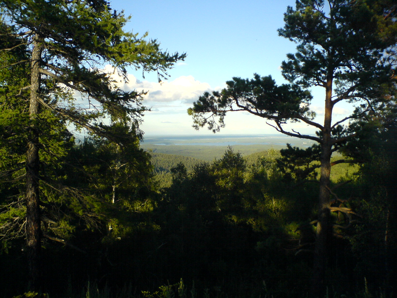 Ильменский заповедник, вид с Ильменского хребта